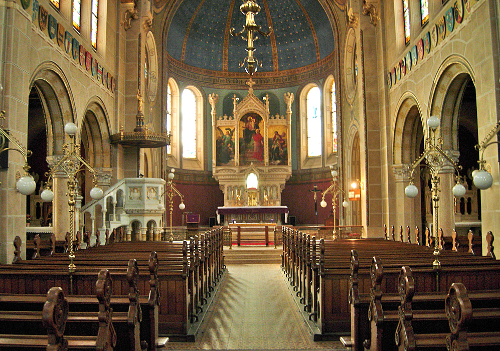 Versorgungsheimkirche Wien, Innenraum